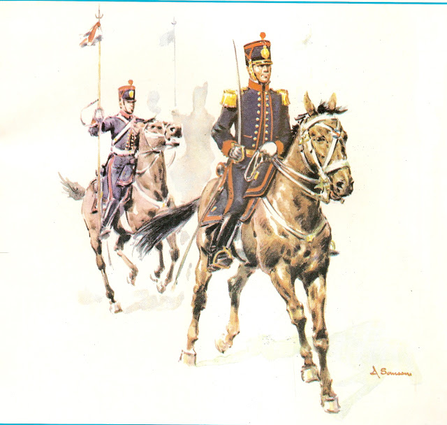 blandengues